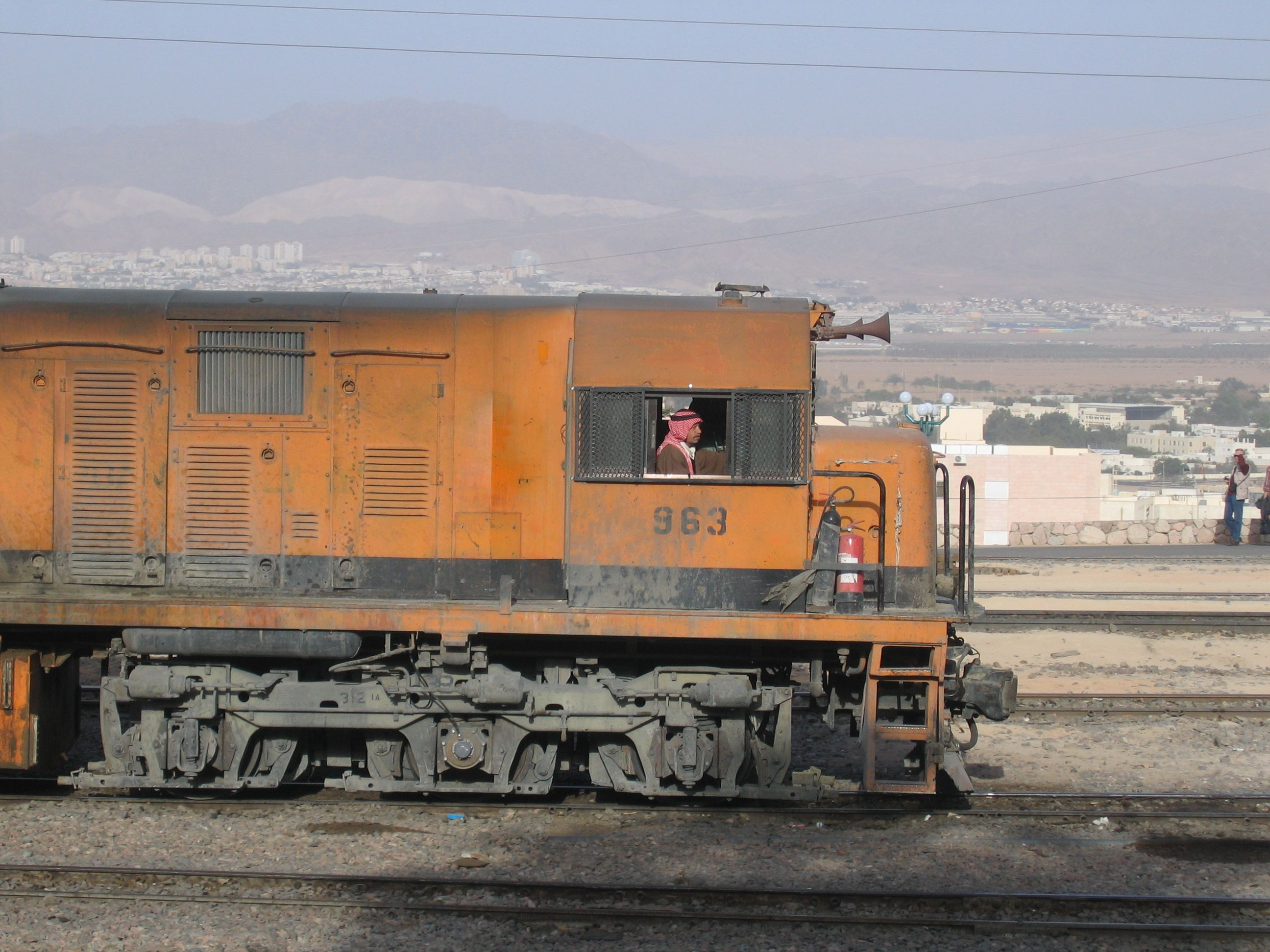 Lokomotive im Bahnhof Aqaba, eigene Aufnahme, Februar 2007